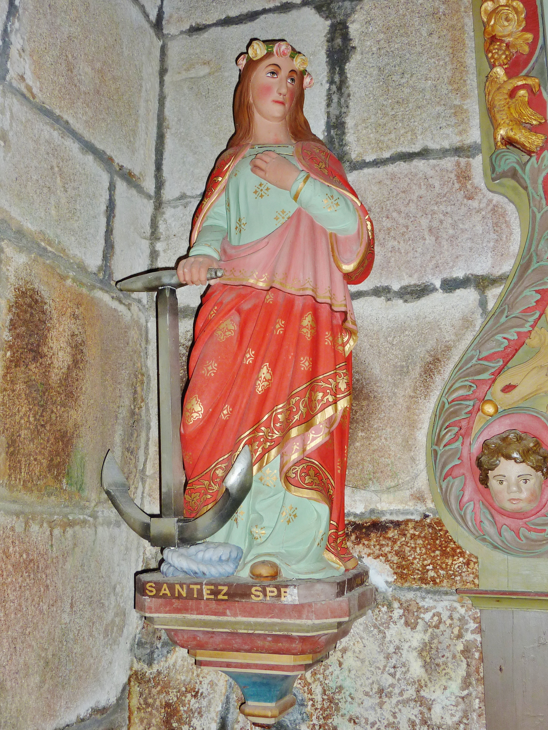 Beuzec-Cap-Sizun : église Notre-Dame-de-la-Clarté, statue de Santez Spe (en breton, Sainte Espérance)